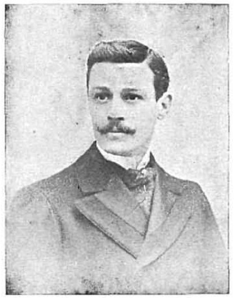 Sr. D. Wenceslao E. Retana. Gobernador de TeruelFOT. ALVIACH